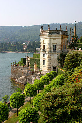 Isola Bella, Stresa, Piemonte, Italy